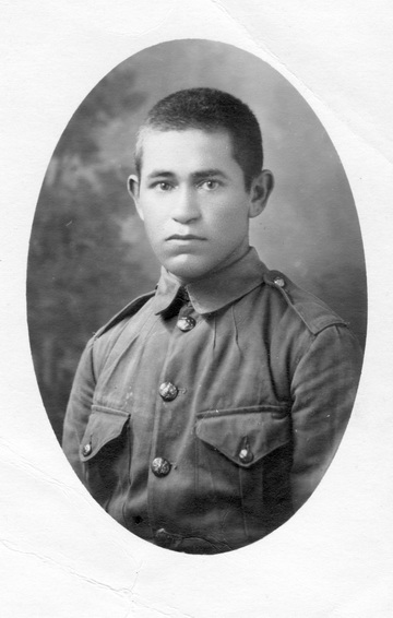 1918, שמעון קושניר במדי הגדוד העברי, מזכרת לאהרון שר. - בן ציון ישראלי